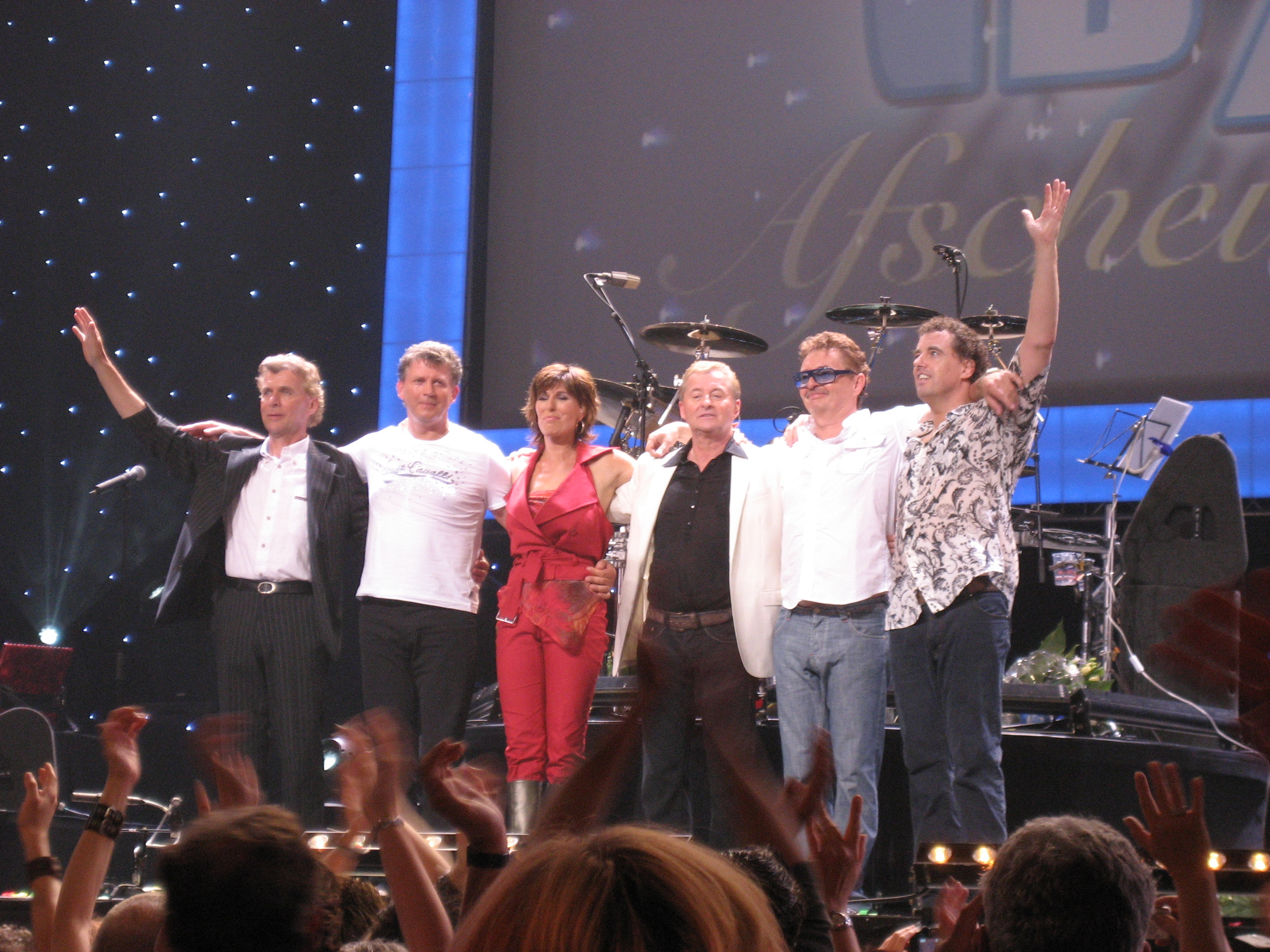 BZN aan het eind van hun afscheidsconcert in Ahoy' Rotterdam, 16 juni 2007